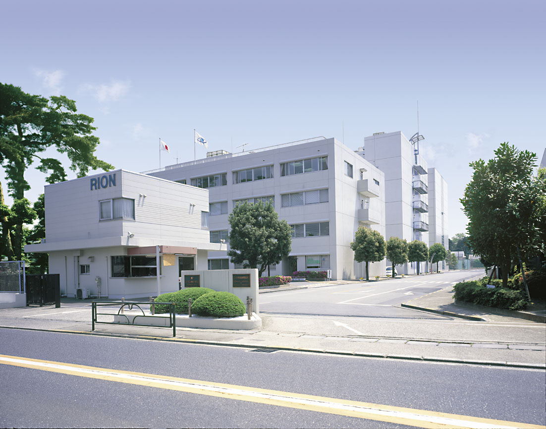 リオン株式会社本社